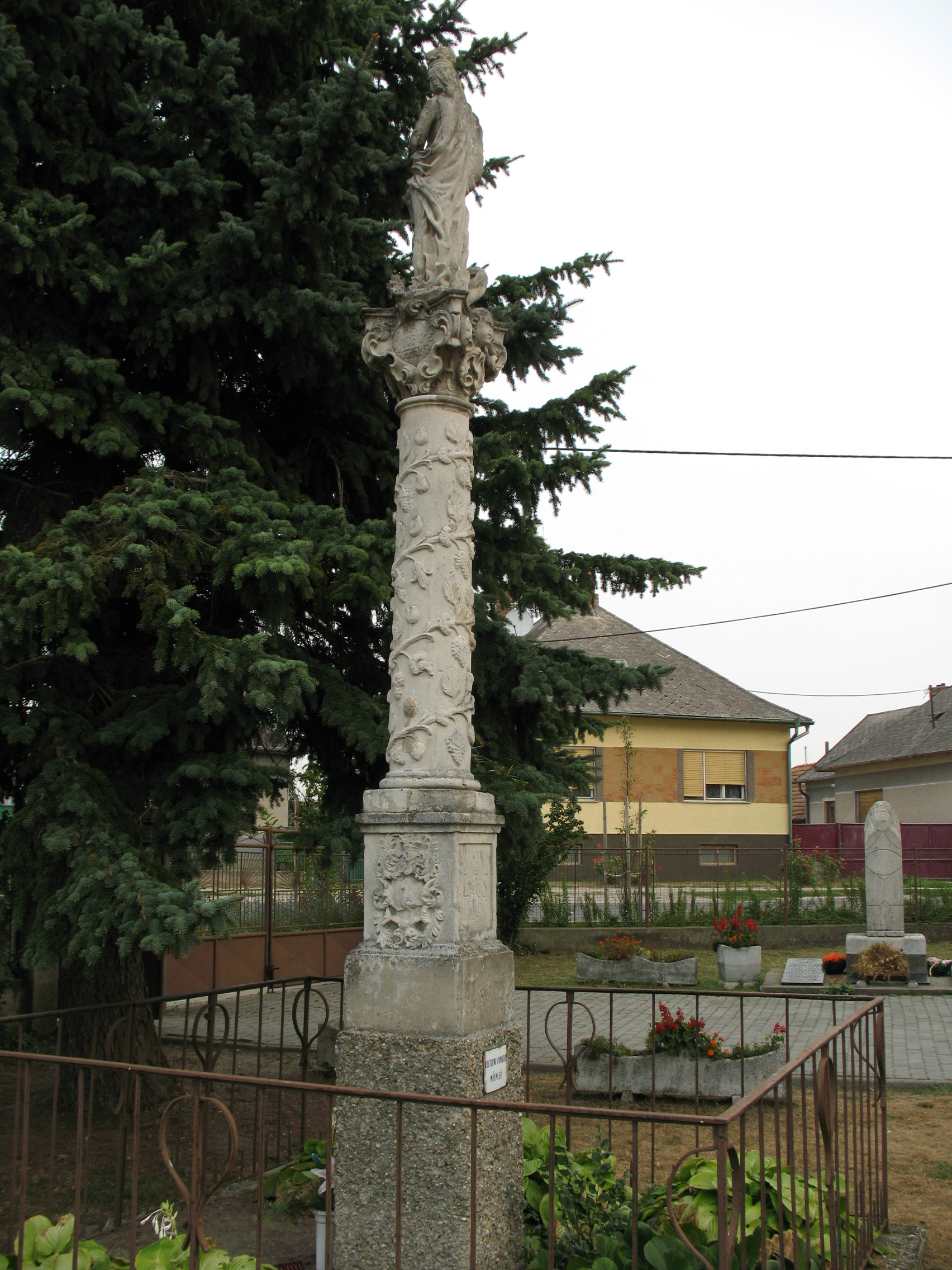 mária szobor